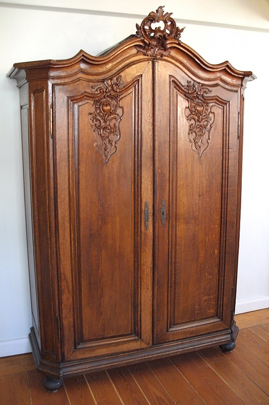 Bilder aus dem Couven-Museum - Diverse Schränke